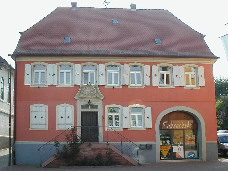 Pfarrhaus in Eschelbronn